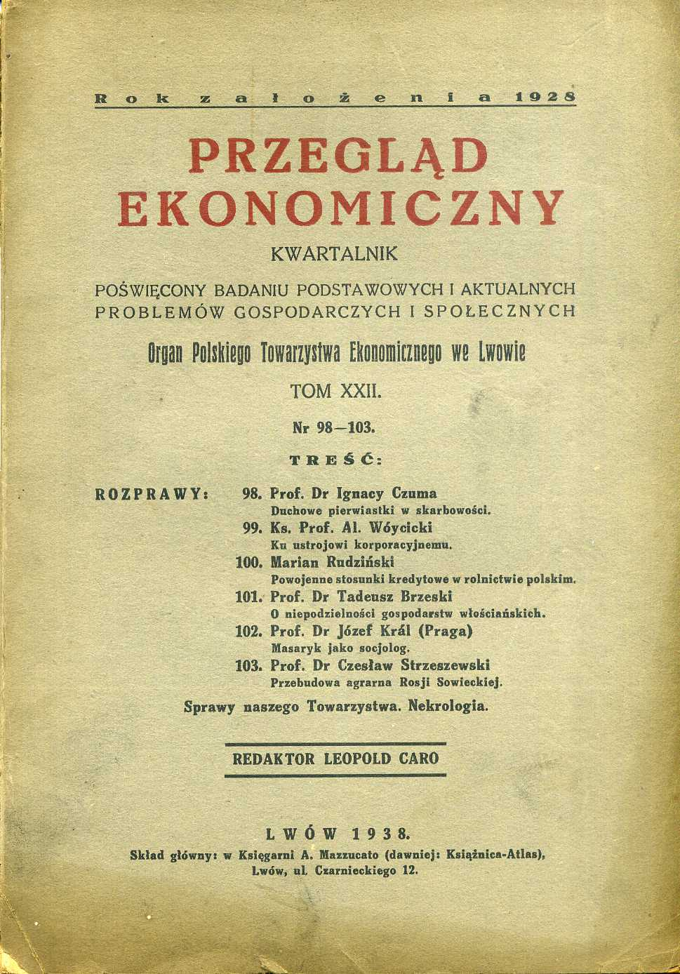 Okładka kwartalnika Przegląd Ekonomiczny, tom XXII, organ Polskiego Towarzystwa Ekonomicznego we Lwowie. Poświęcony badaniu podstawowych i aktualnych problemów gospodarczych i społecznych.